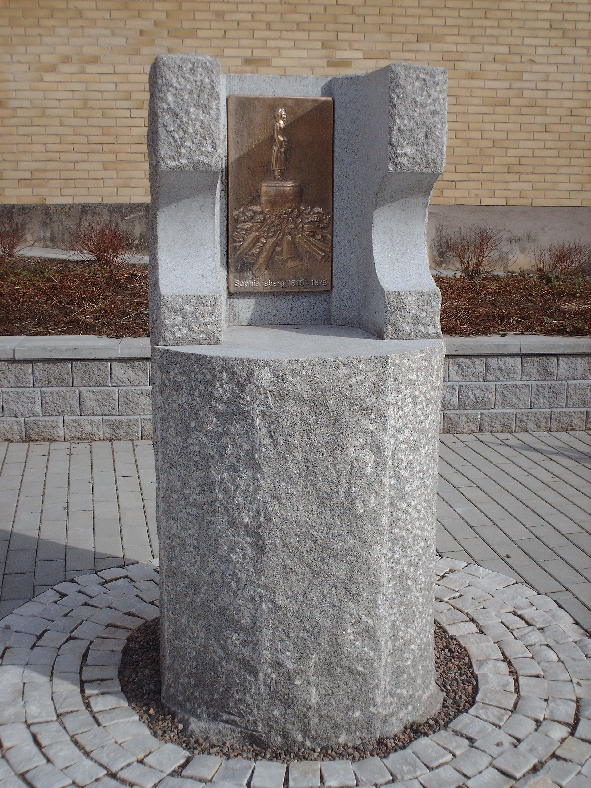 Staty över Jungfru Isberg, Gamla stan, Motala, Östergötland.